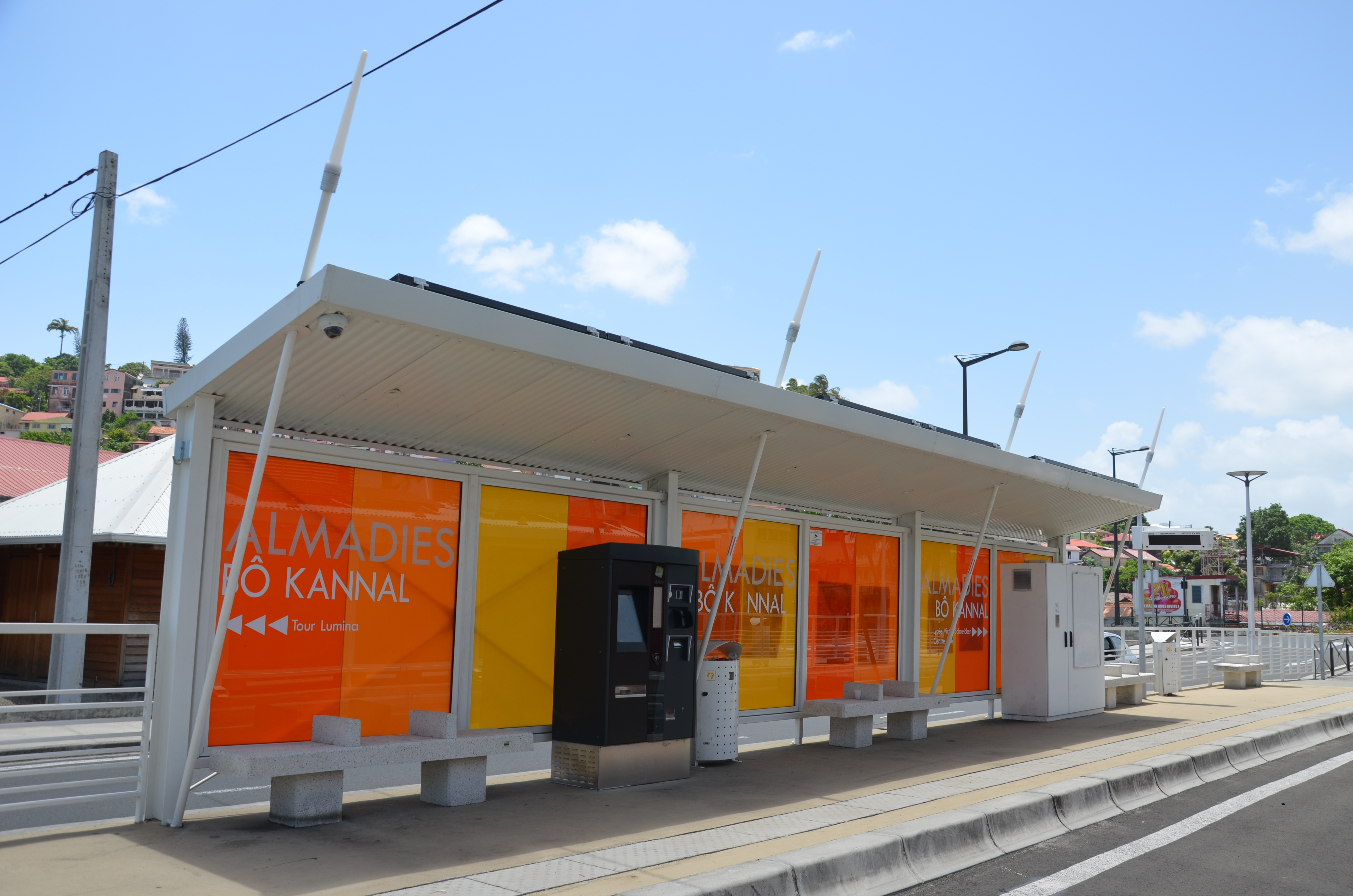 Station terminus "Almadies-Bô Kannal" du TCSP à Fort-de-France, en Martinique.